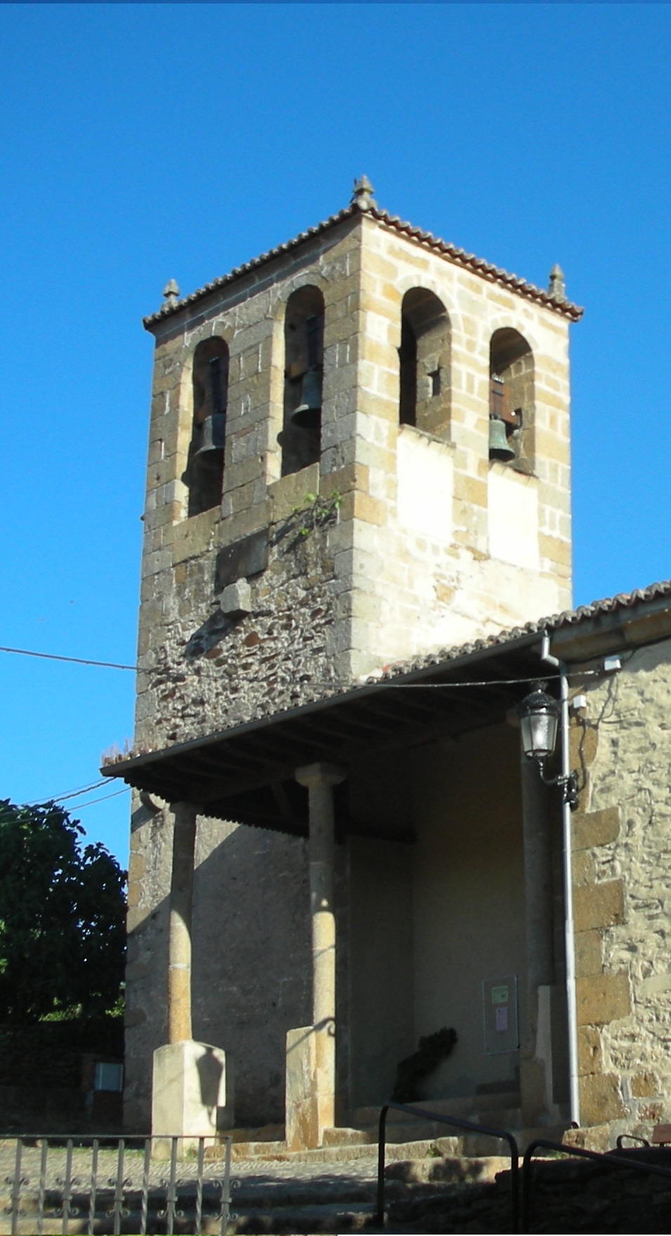 Détail campanile Eglise Nuestra Señora de la Asunción de la Commune de Sotoserrano en Espagne